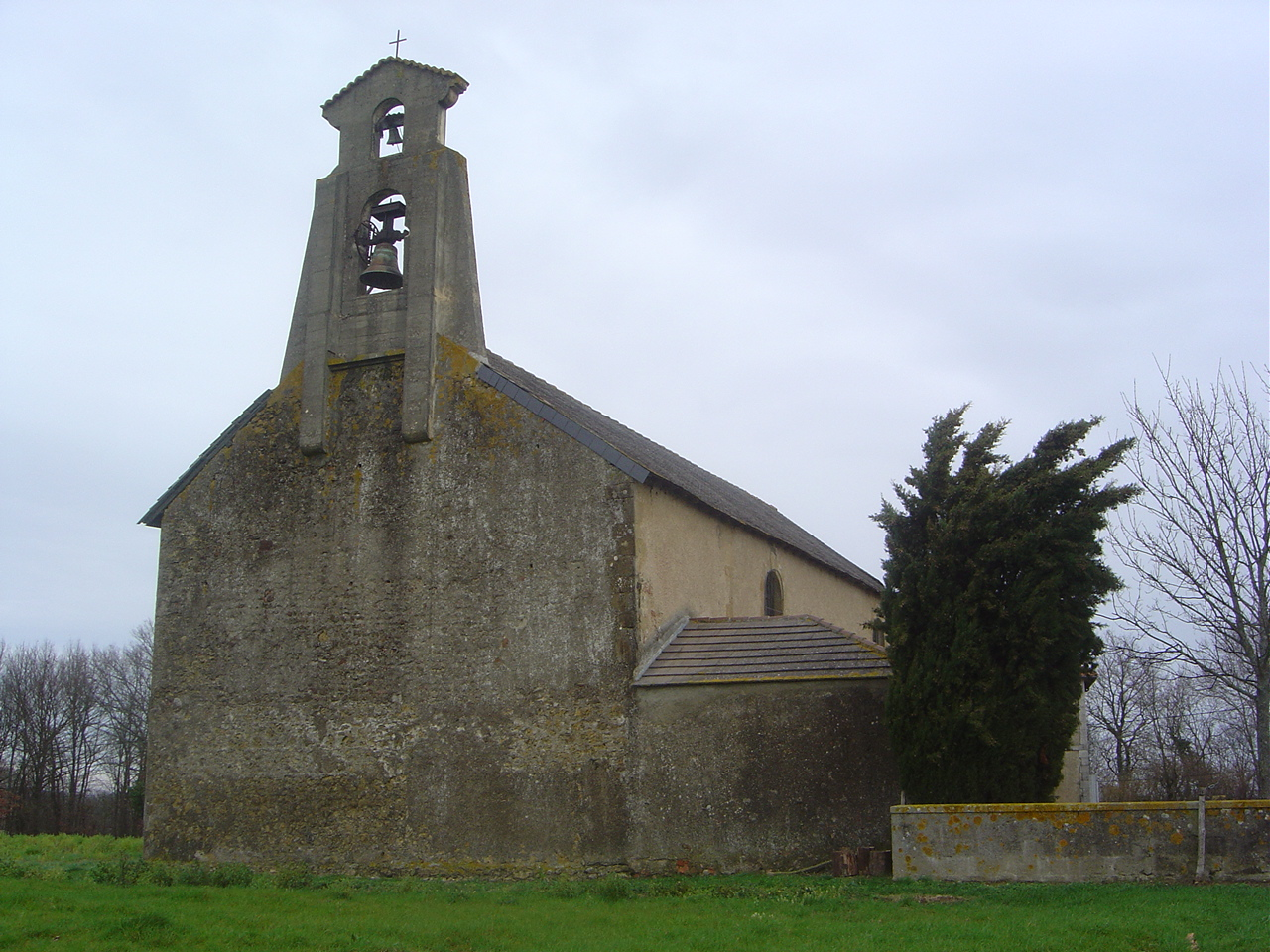 Eglise Saint-Barthélemy